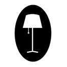 Malá verze loga nakladatelství